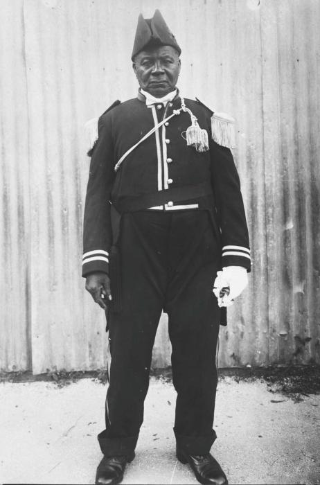 Foto. De Granman is het hoofd van een Marron-groep, de Saramakkaners, of Saamaka. Hij wordt gekozen en geïnstalleerd door zijn eigen stam. Zijn aanstelling werd officiëel bekrachtigd door het Surinaamse gouvernement. Van de regering kreeg de Granman vervolgens een salaris toegekend en mocht hij de officiële ambtskleding dragen die op deze foto te zien is.. Portret van Granman Atudendu van de Saramakaners van 1934 tot 1949.